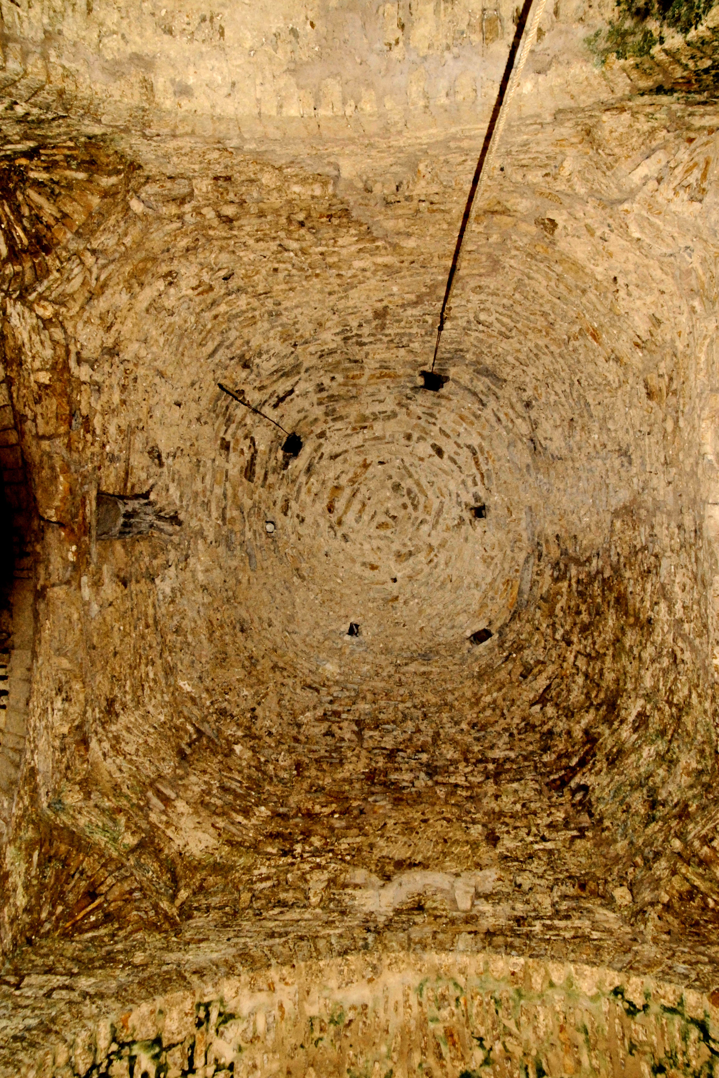 Saint-Hymetière, Trompenkuppel, mit Tambour und Blendarkaden- Fries